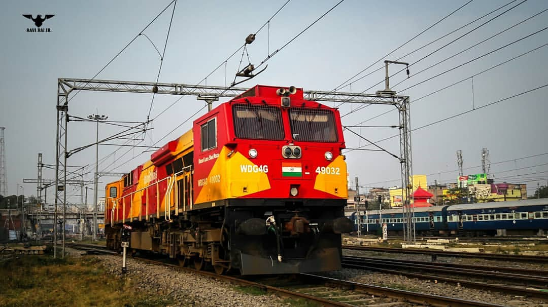 ROZA WDG4G 49032 roaming at Katihar Jn